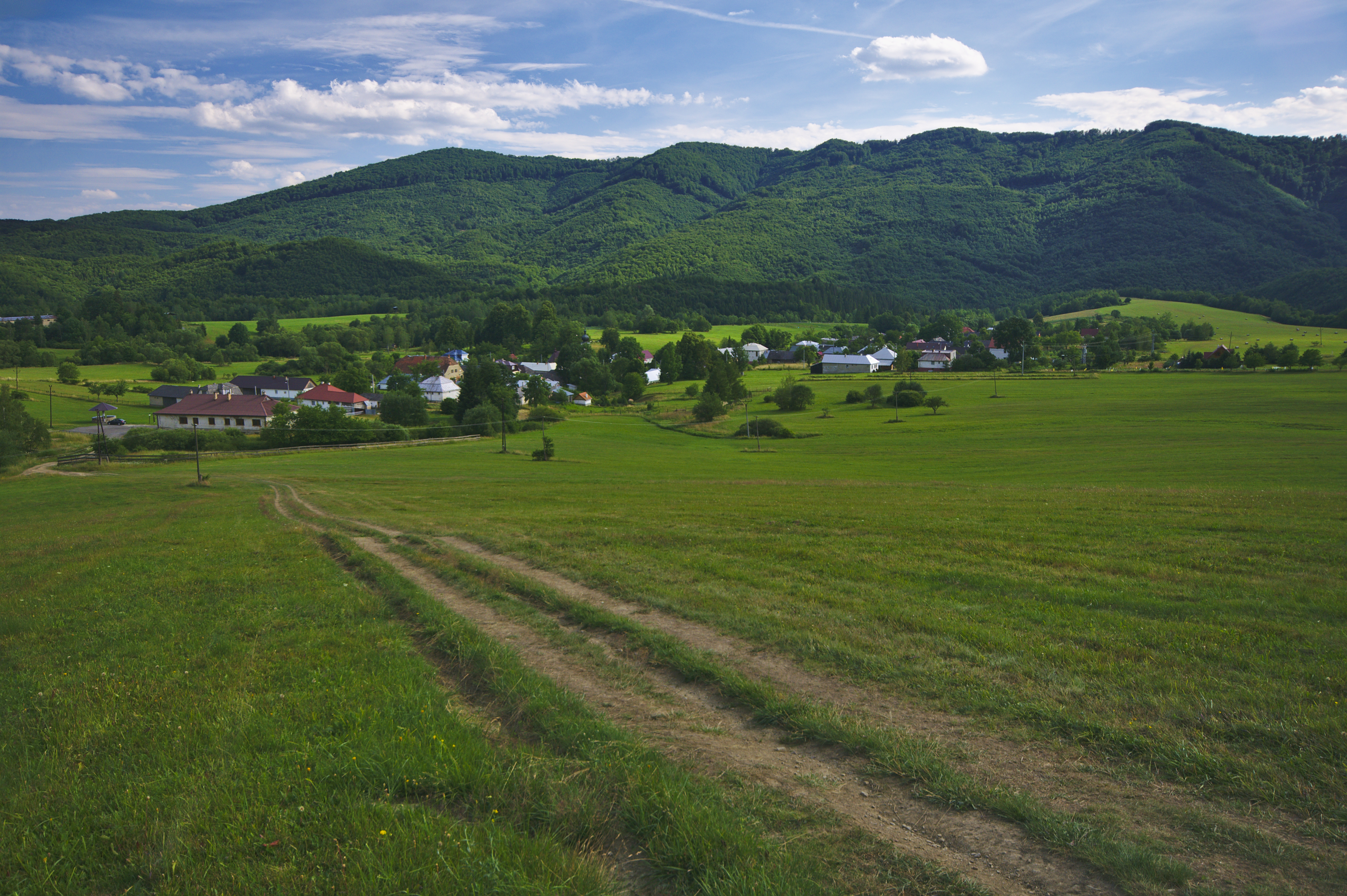 Obec od severu, Runina, okres Snina